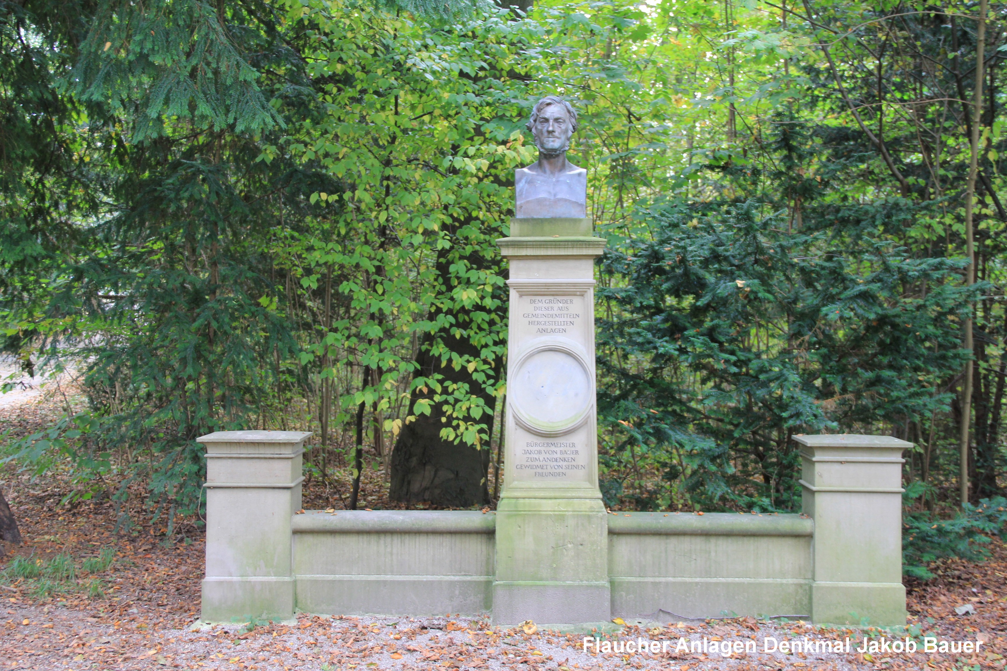 München Sendling